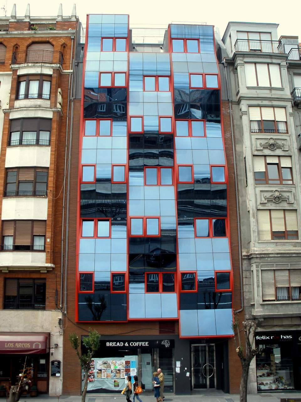 Calle Hurtado de Amézaga (Bilbao)